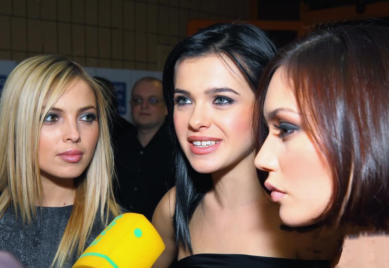 "Песня года" - 2009. Олимпийский